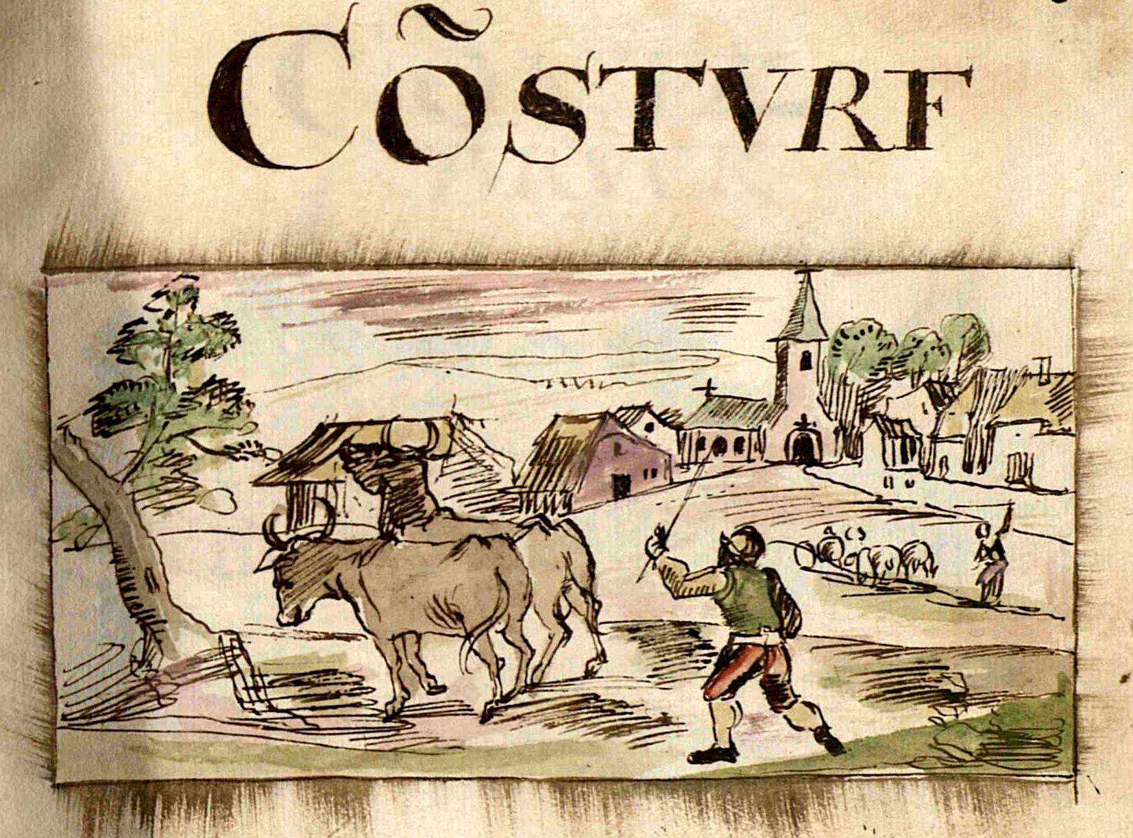 "Co[n]sturf" (today: Consdorf, Luxembourg) par Jean Bertels, fol. 30 du Registre des biens de l'abbaye Saint-Willibrord d'Echternach.